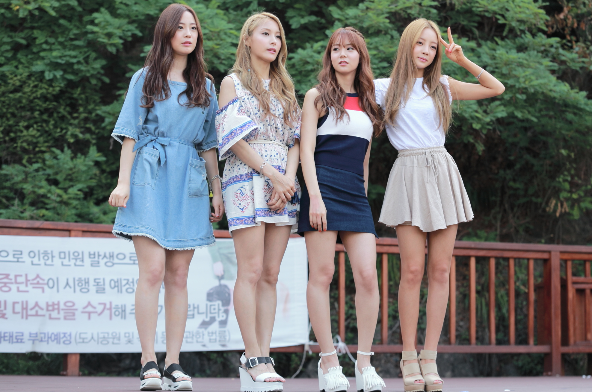 150621. 카라 팬미팅 & 퇴근길